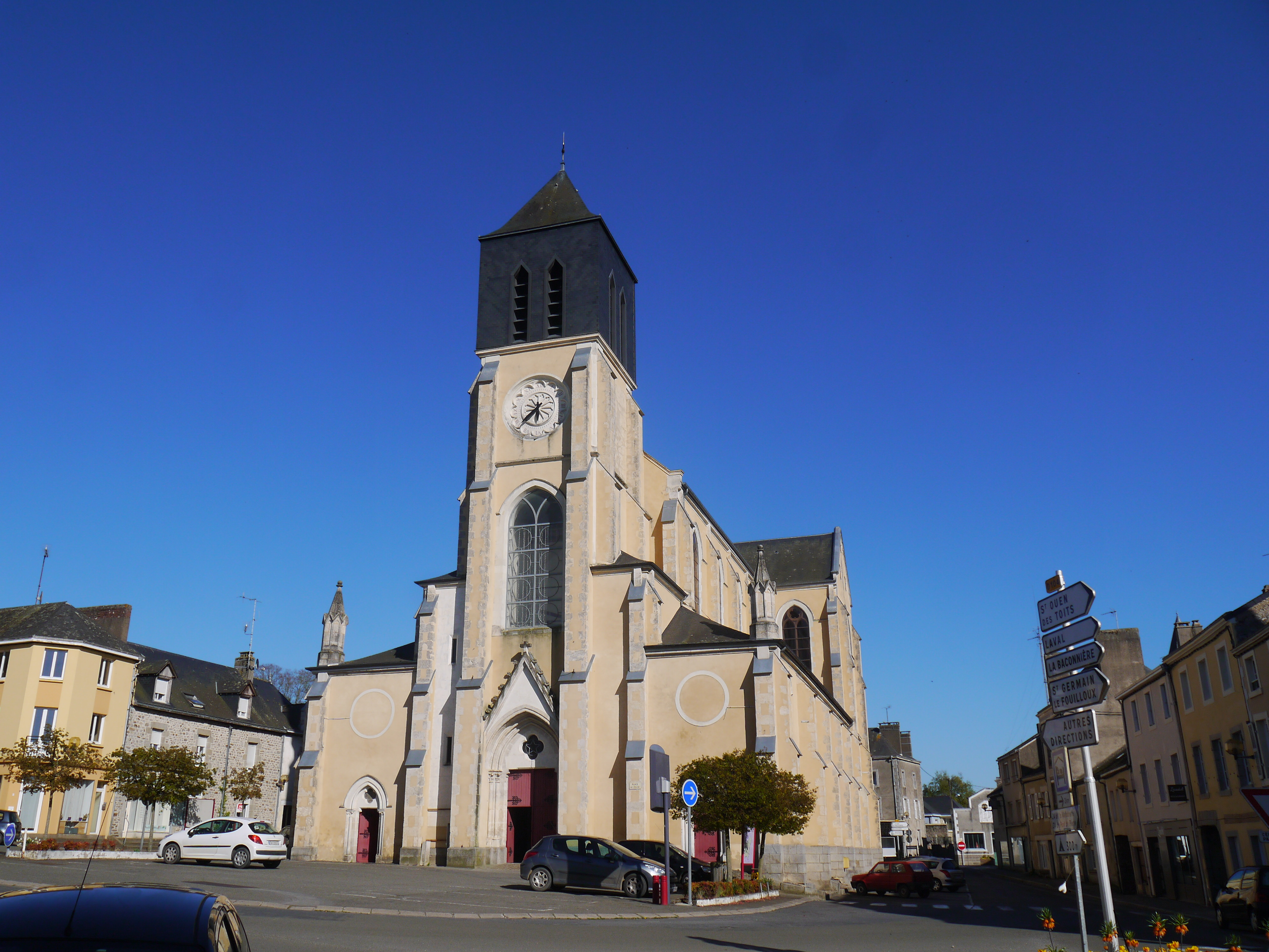 L'église Saint-Matthieu.